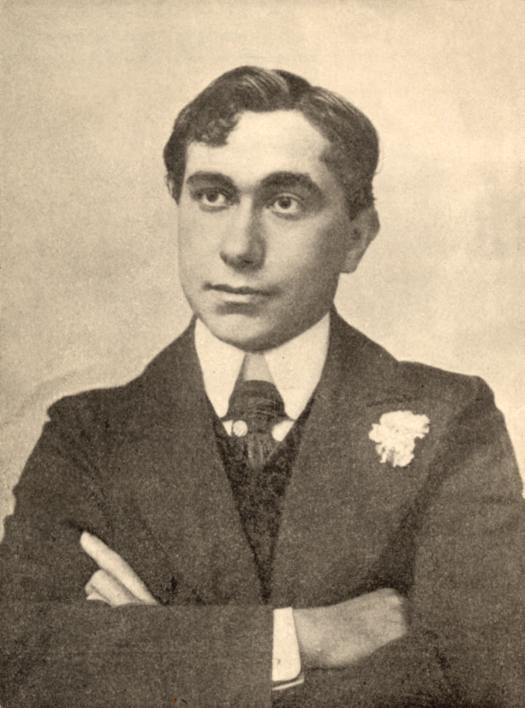 Lo scrittore, giornalista, illustratore e fumettista italiano Enrico Novelli, in arte Yambo.